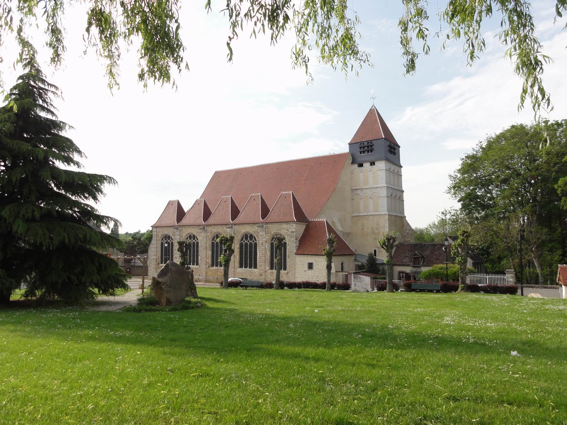 époque de construction 1ère moitié 12e siècle ; 16e siècle GPS : 48.042275, 3.062161 .